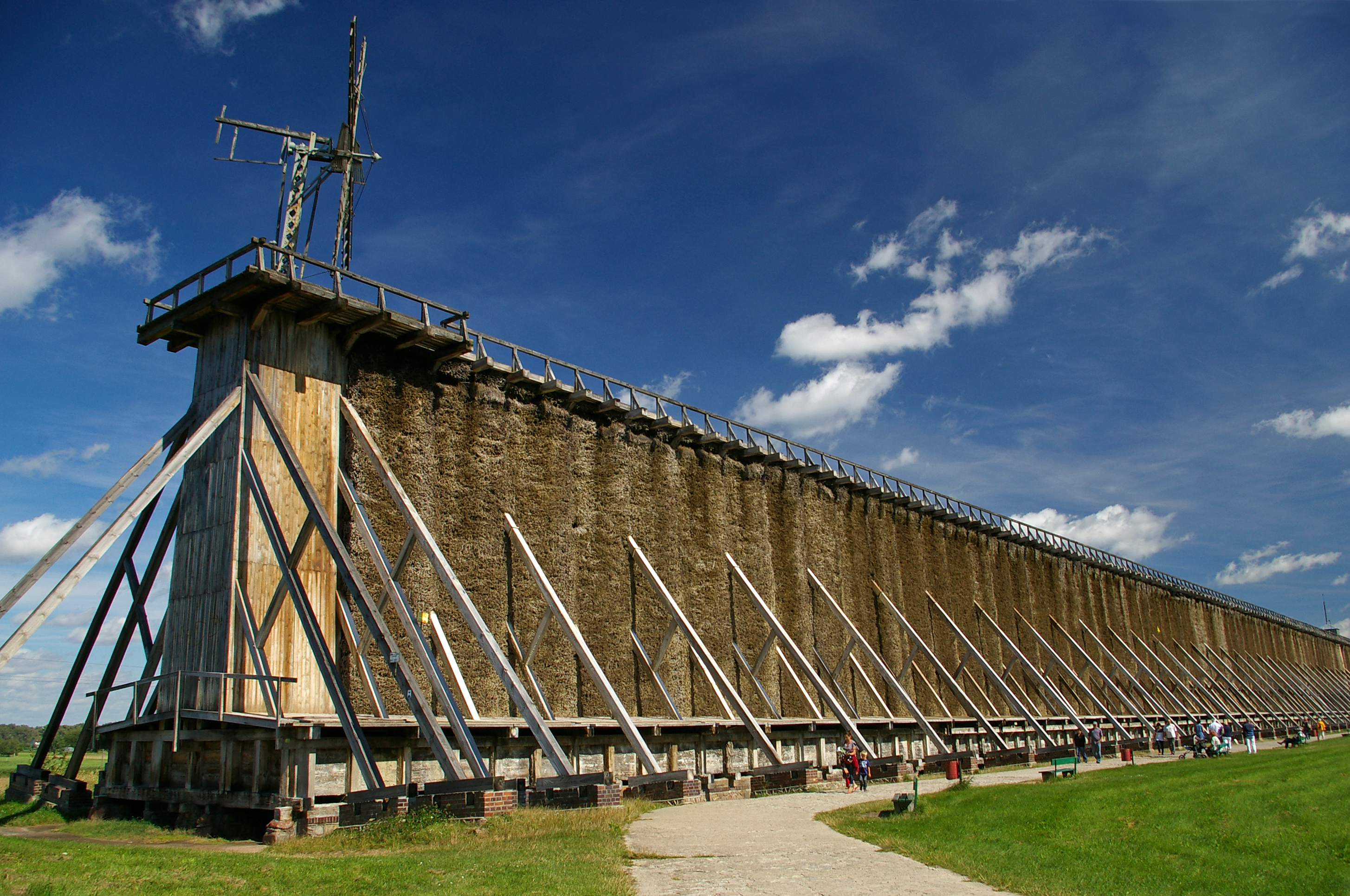 Ciechocinek, tężnia nr 3